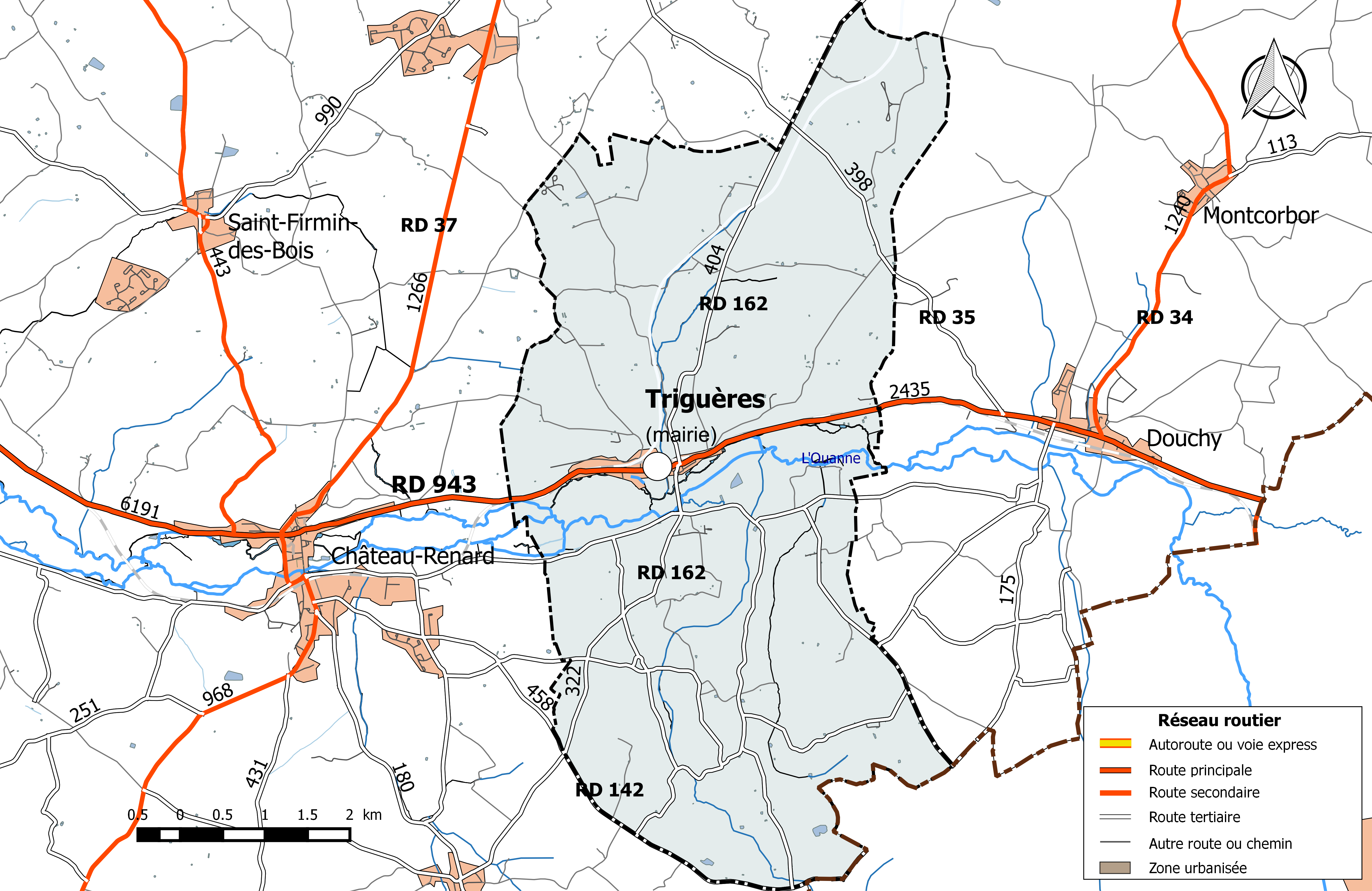 Carte du réseau routier de la commune de Triguères.